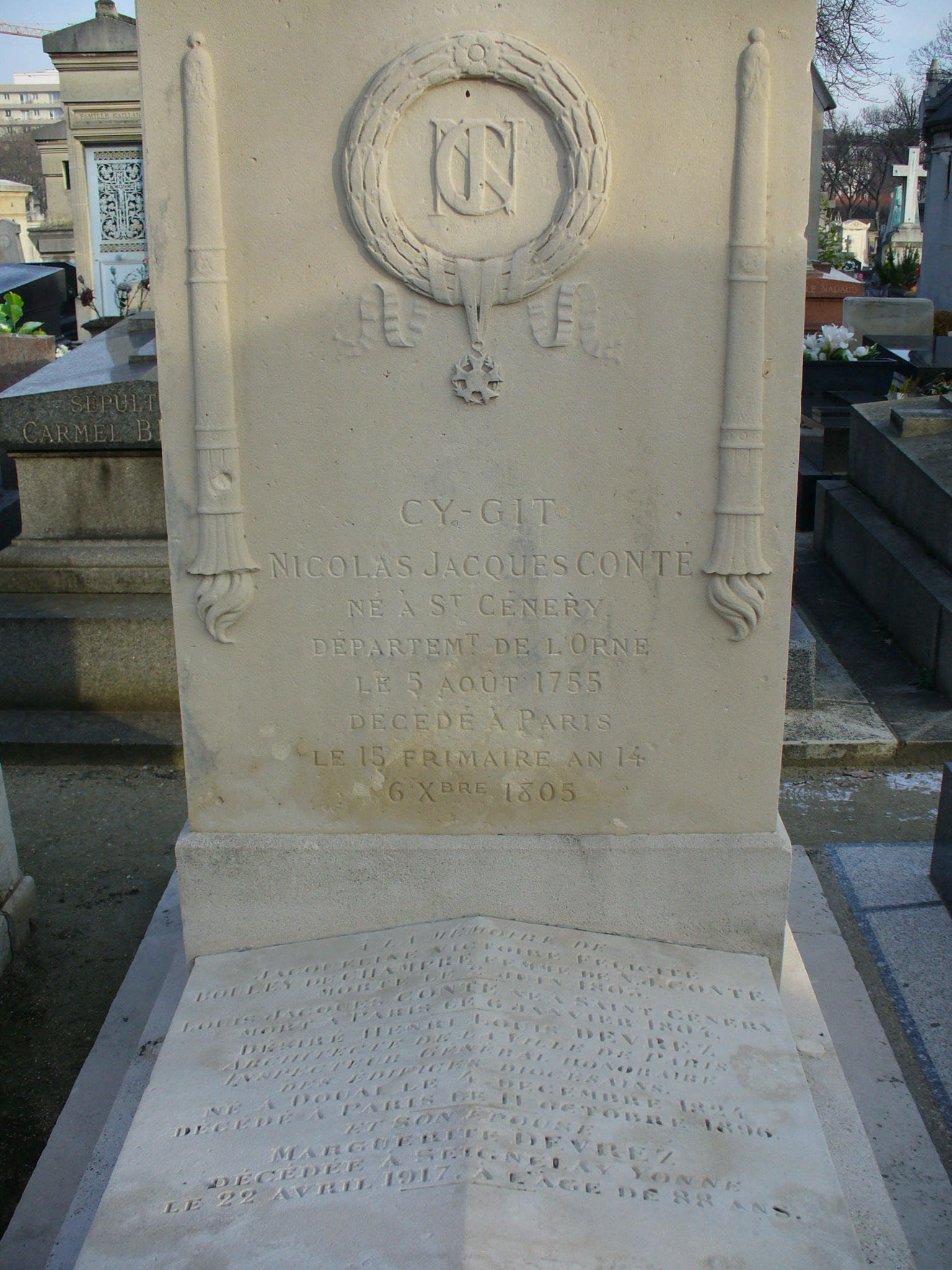 Tombe de l'inventeur Conté au cimetière Montparnasse (Paris)